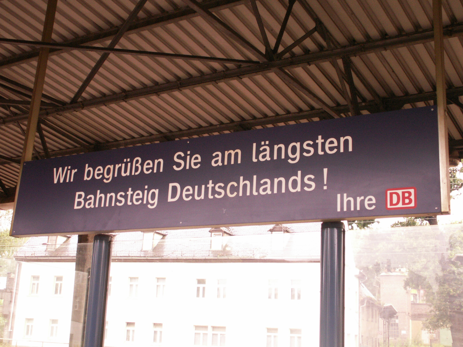 Gößnitz